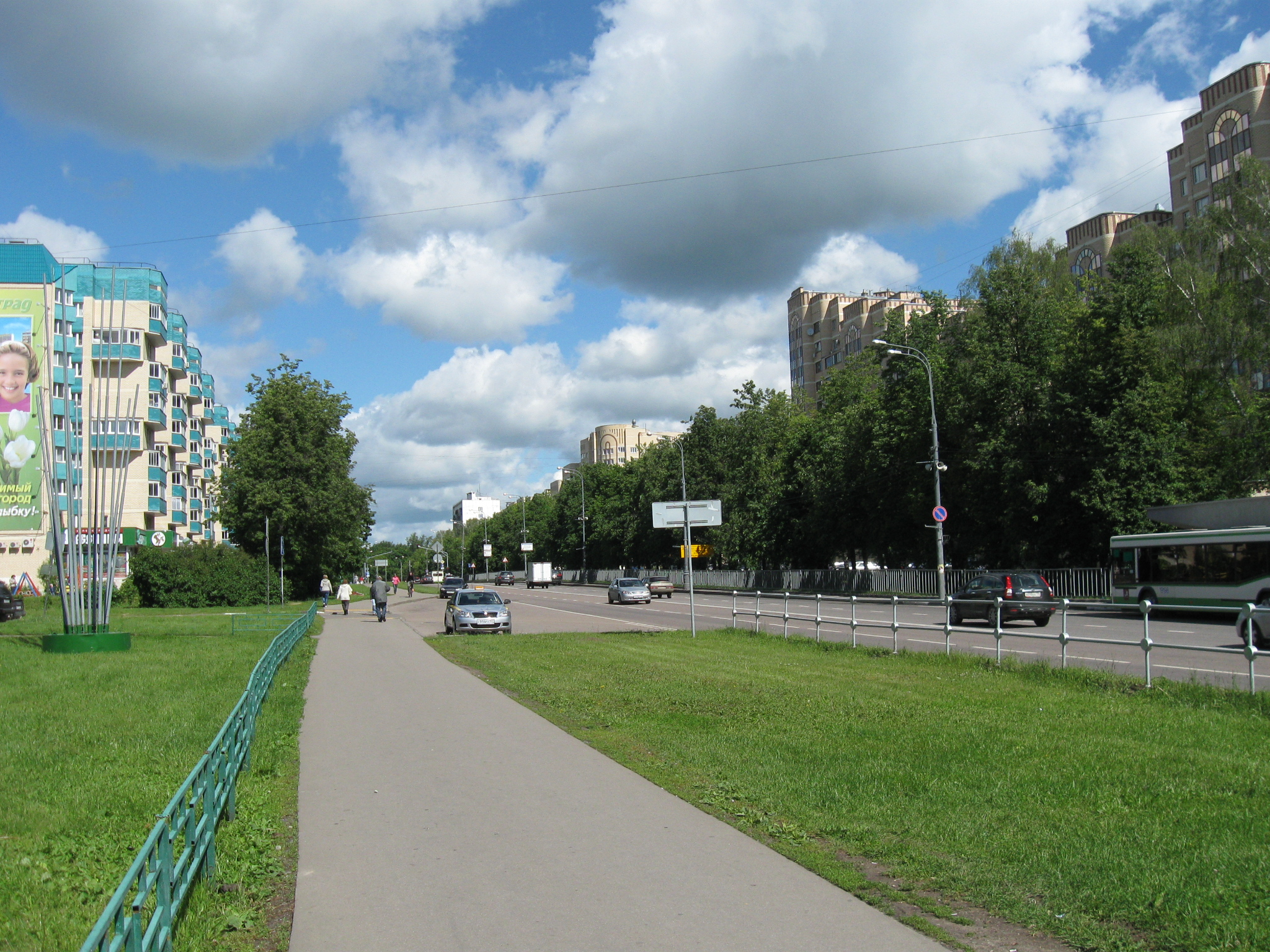 Проспект Генерала Алексеева (вид от его начала со стороны второго микрорайона в строну первого микрорайона)